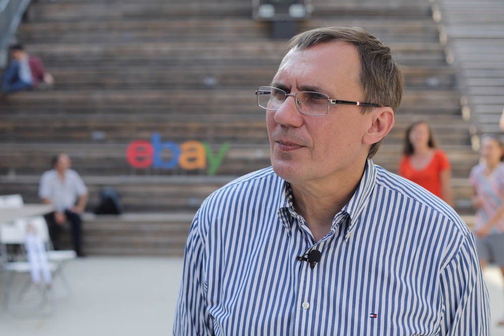 Владимир Долгов на пресс-конференции eBay